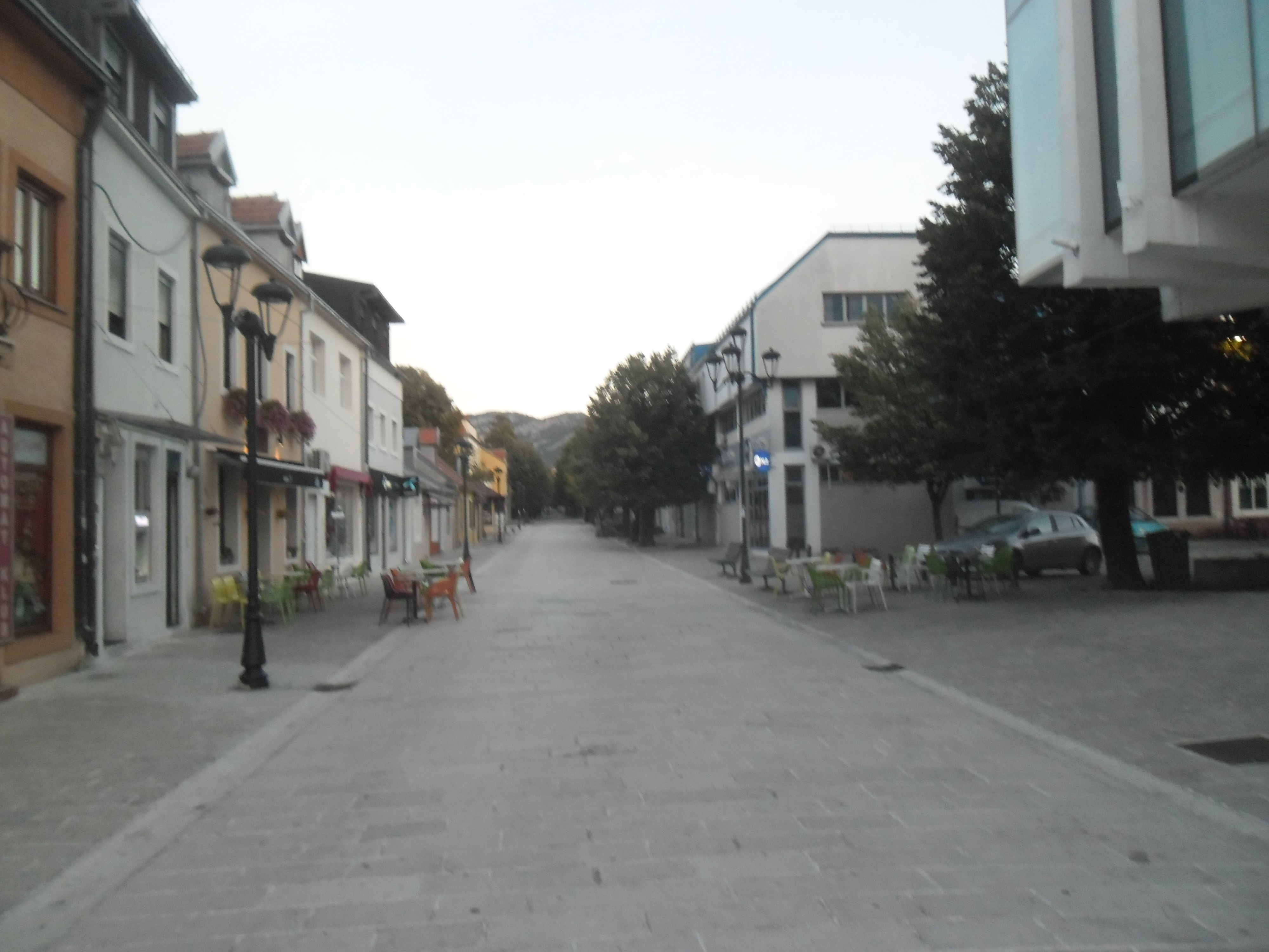 Cetinje